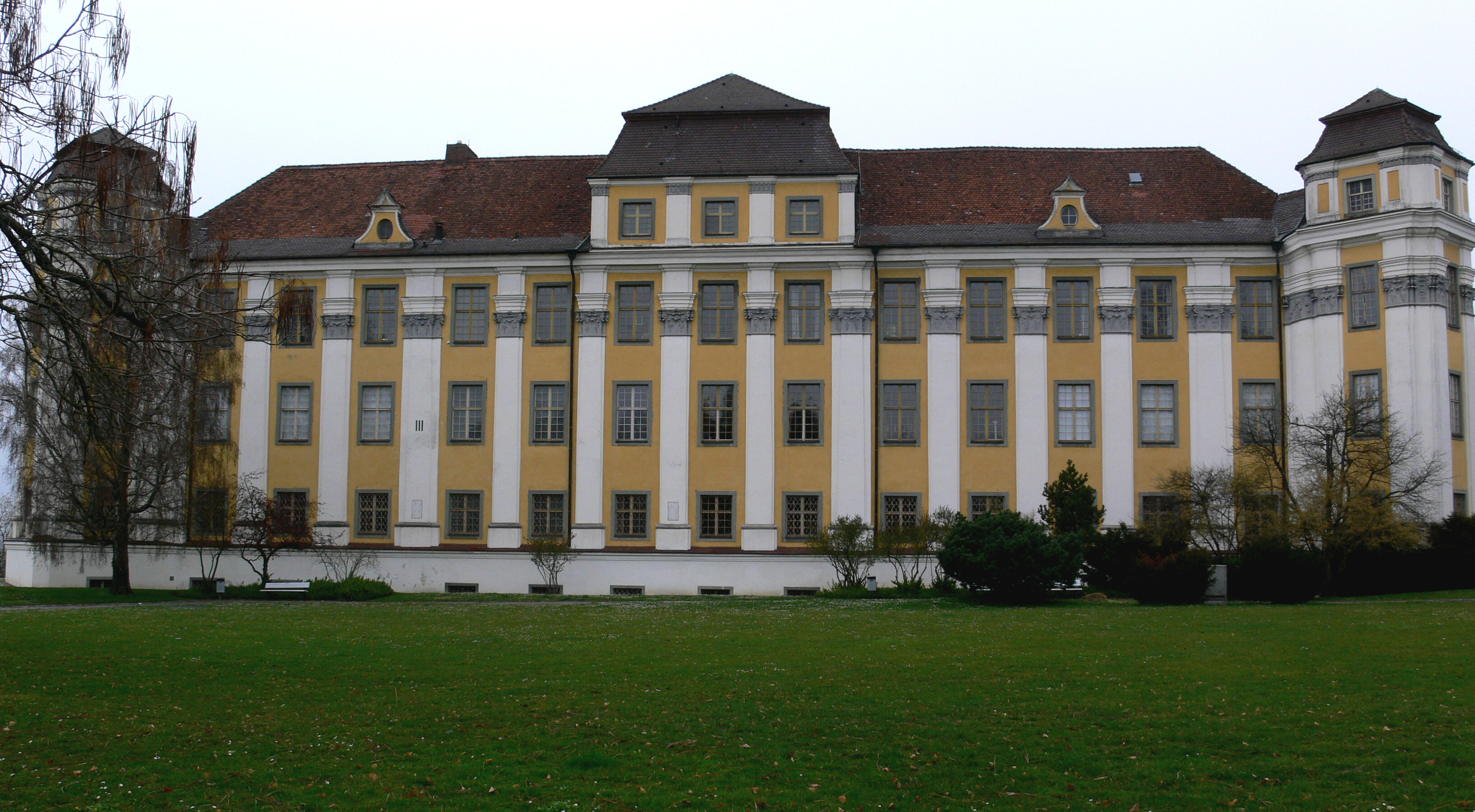 Neues Schloss, Tettnang, Bodenseekreis Fassade von Südosten